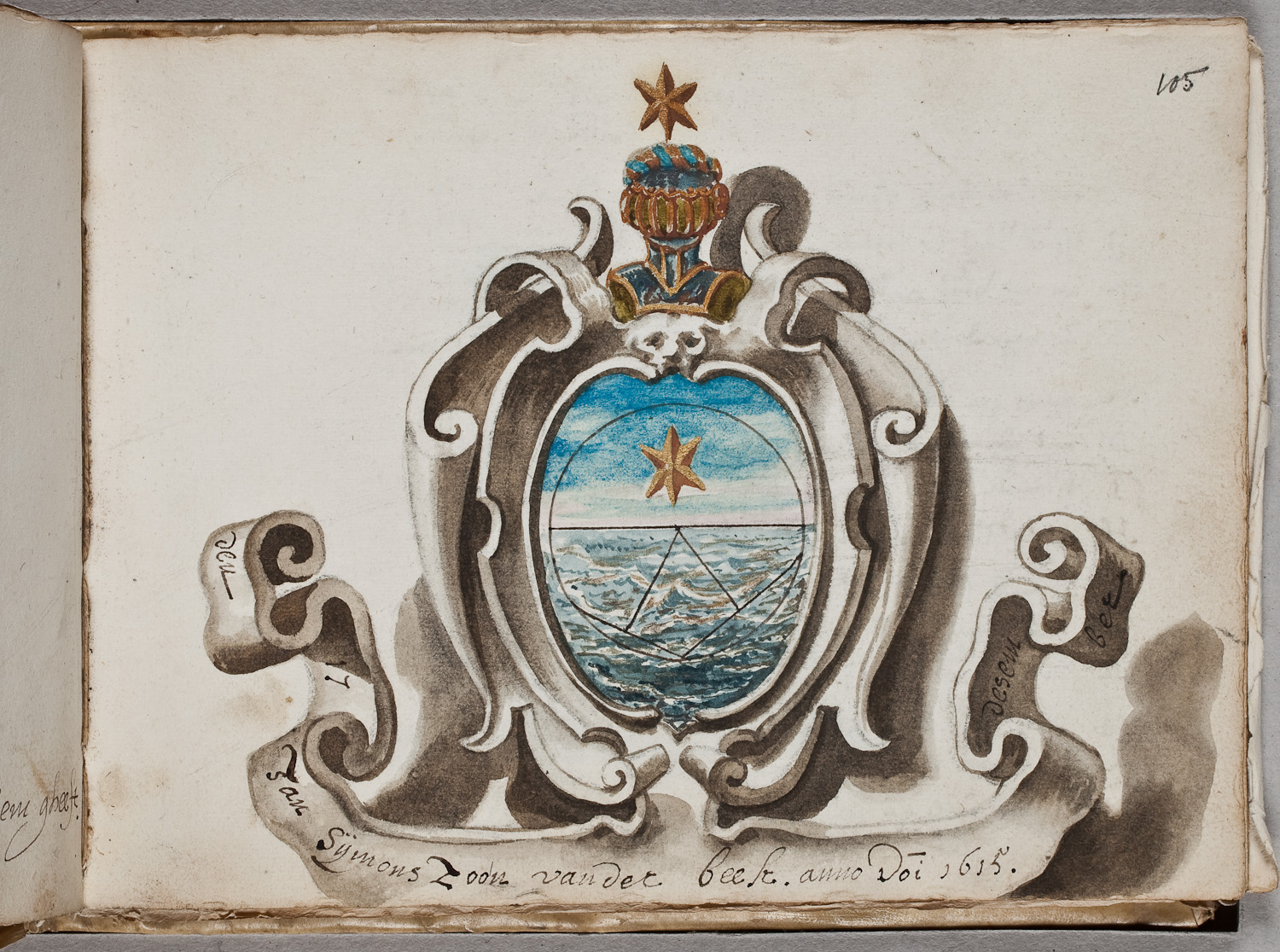 Aquarel van Johannes Torrentius, op 17 december 1615 aangebracht in het album amicorum van de befaamde schermmeester Gerard Thibault (ca. 1574-1627)